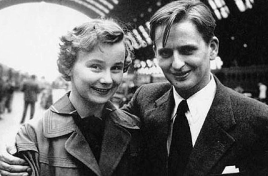 Olof och Lisbet Palme